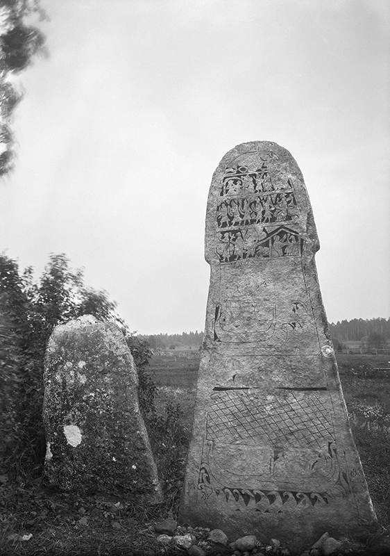 RAÄ-nummer Buttle 42:1 och Buttle 42:2. Bildstenar vid Änge. Motiv: Buttle 42:1, Buttle 42:2 Nyckelord: Riksintressen Kategori: Bildristning RAÄ-nummer Buttle 42:1 och Buttle 42:2. Bildstenar vid Änge. Buttle 42:1, Buttle 42:2.